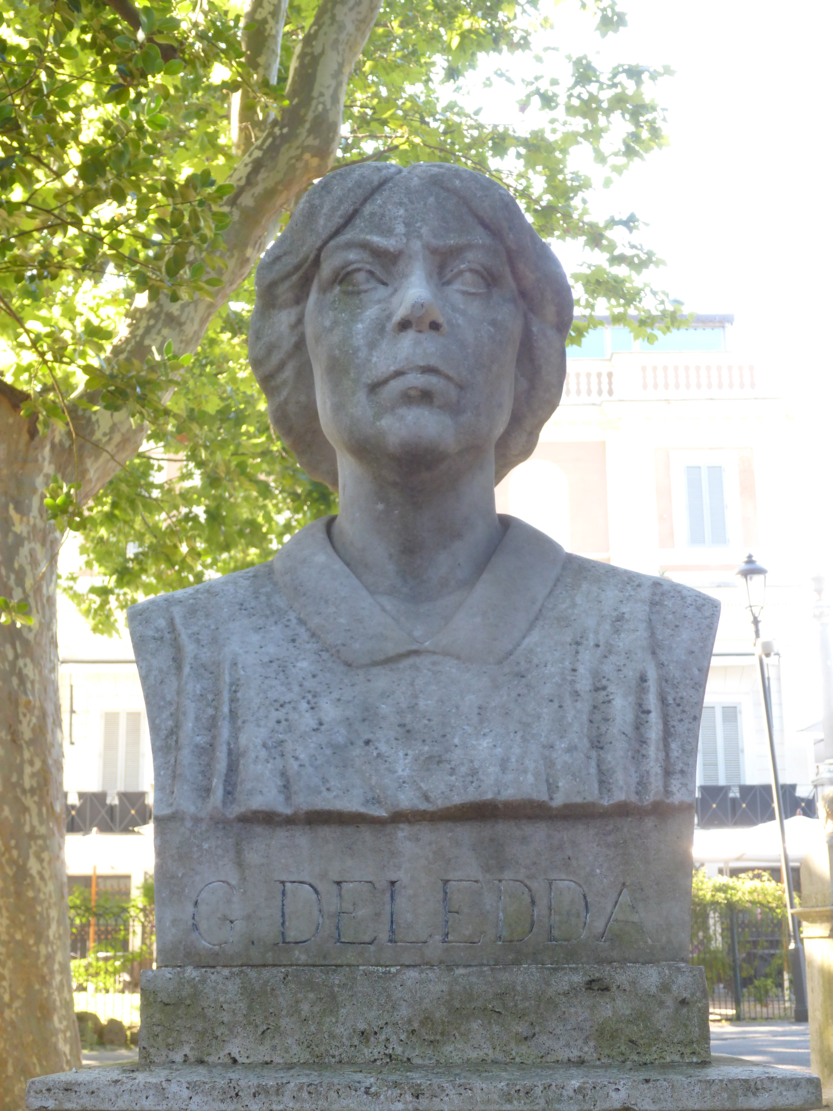 Roma, Pincio. Busto di Grazia Deledda.